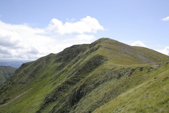 Brebeneskul szczyt